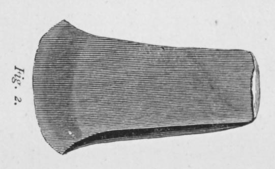 Ungarisches Flachbeil aus Kupfer, Endneolithikum oder FBZ Ungarische Schaftlochaxt des Äneolithikums